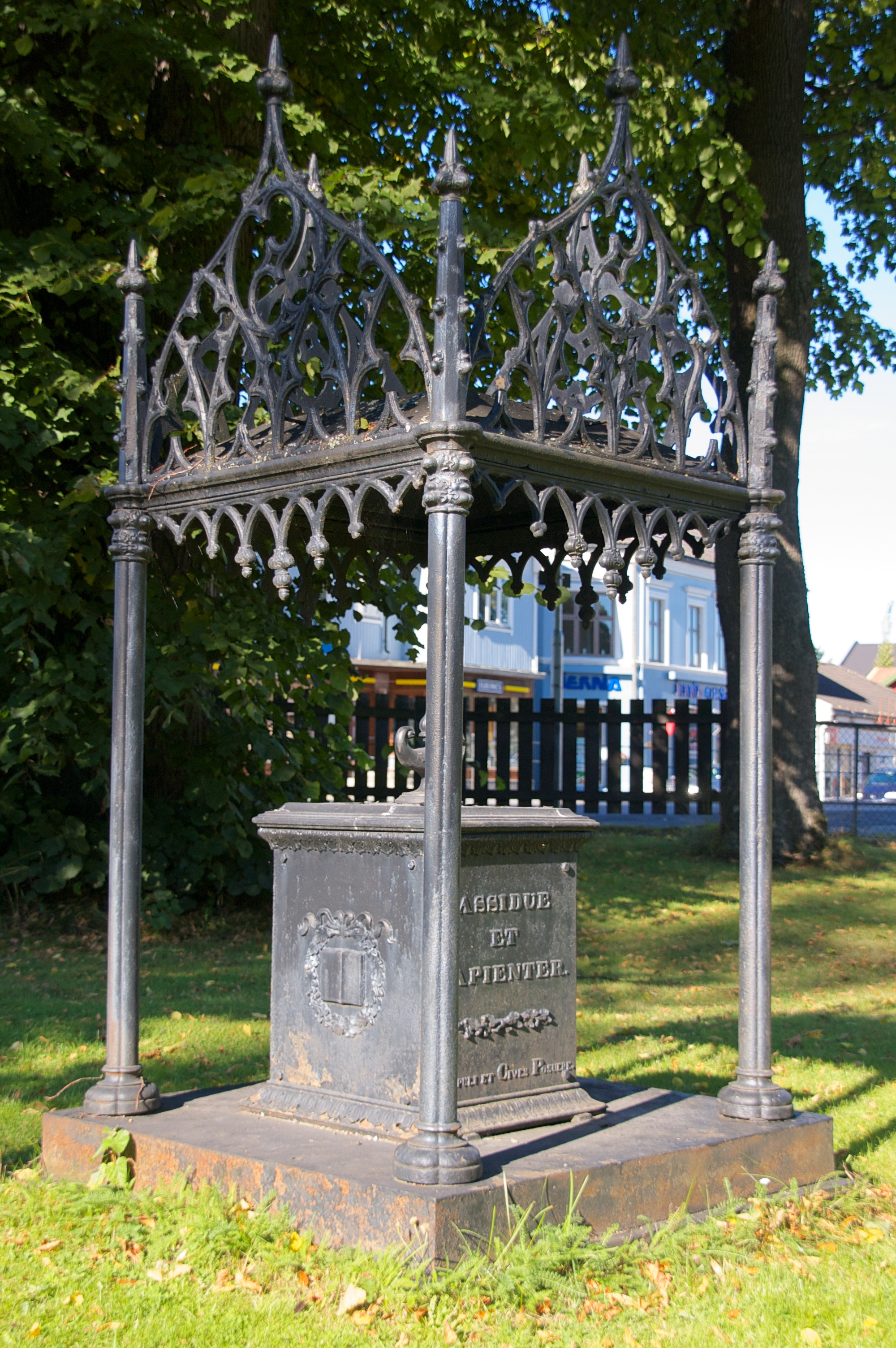 Knut Ramshart Ørn gravminne